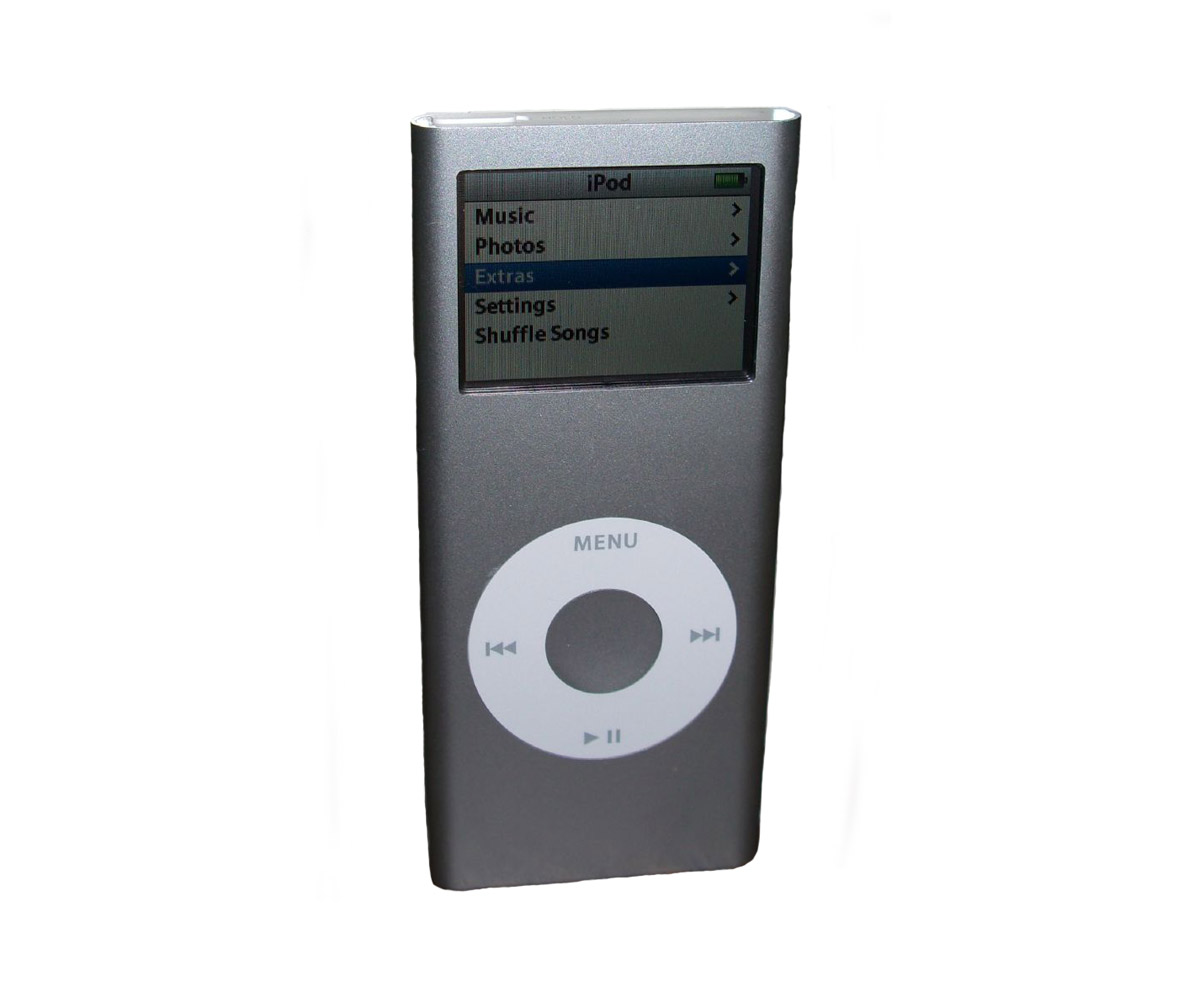 2G iPod mini